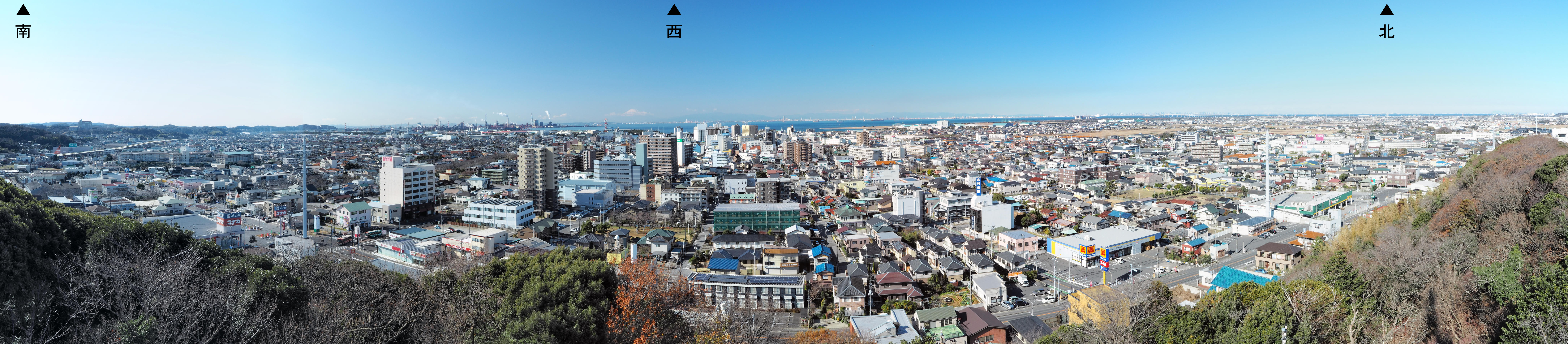 木更津市市街地のパノラマ画像。 Kentagonが2019-01-01に太田山公園にて撮影した写真を元に、パノラマ作成ツール"Image Composite Editor Ver2.0.3.0"を使用して、合成した。 また、ドローソフト"Inkspace Ver0.92"を使用して、地名等を脚注した。